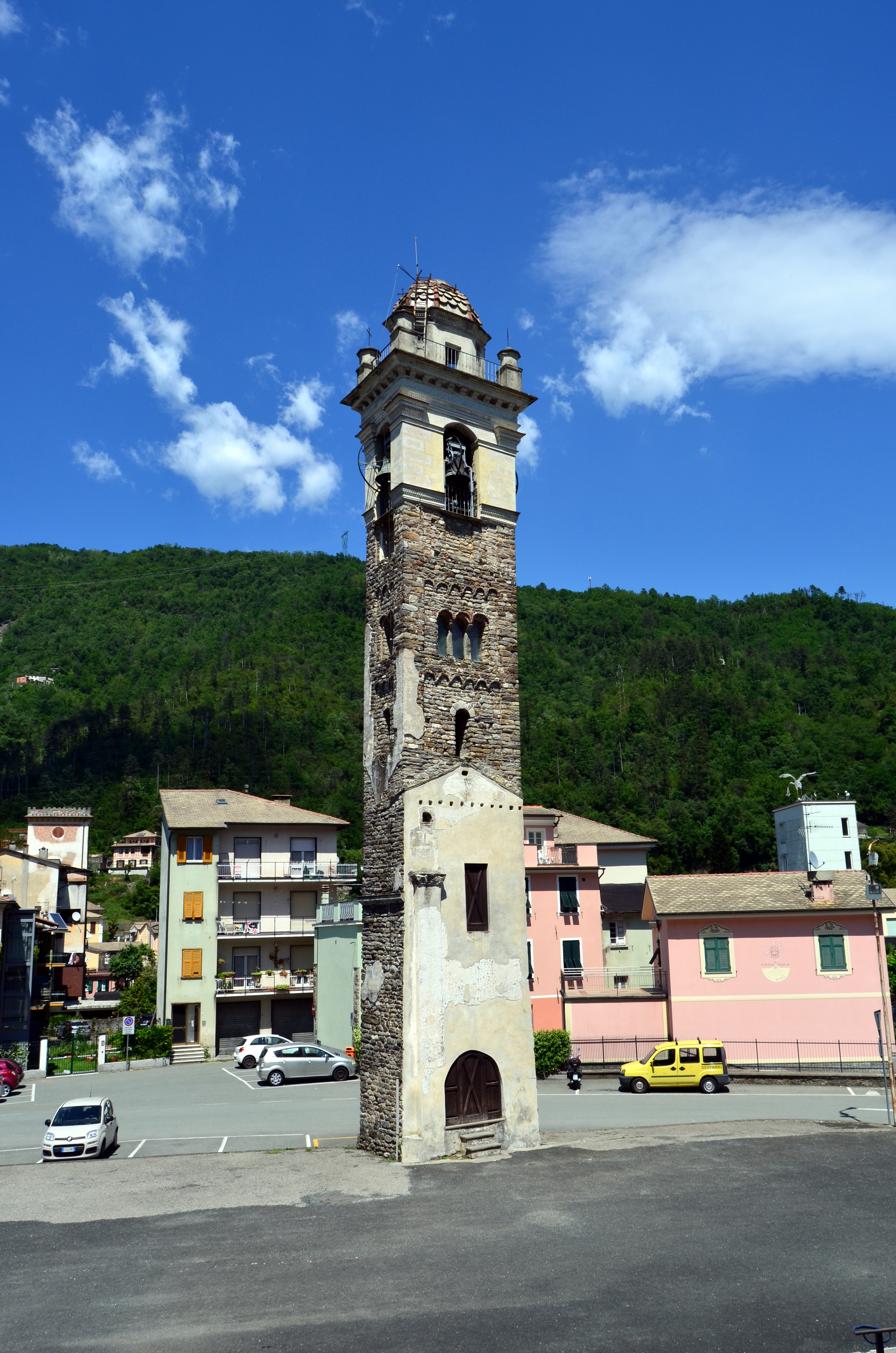 Il campanile del santuario di Nostra Signora dei Miracoli, Cicagna, Liguria, Italia